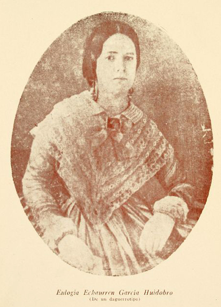 Eulogia Echaurren García-Huidobro (1830-1887) fue Primera Dama de Chile y la esposa del Presidente Federico Errázuriz Zañartu . Su hijo primogénito Federico Errázuriz Echaurren también fue Presidente de la República (1896 - 1901), su hija María Errázuriz Echaurren fue la esposa del Presidente de la República Germán Riesco Errázuriz (1901-1906), y su hija Emilia Errázuriz Echaurren fue esposa del destacado senador liberal Fernando Lascano Echaurren.